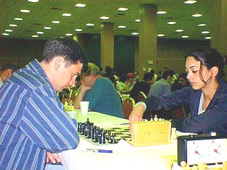 Viktor Bologan en Anna Kan